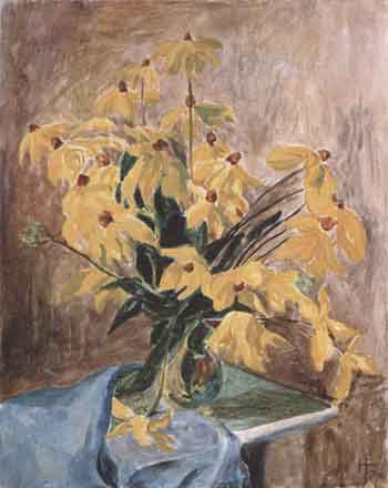 Hans Ralfs Rudbeckien, 1936 Tempera und Öl auf Pappe, 55,2 x 45,4 cm